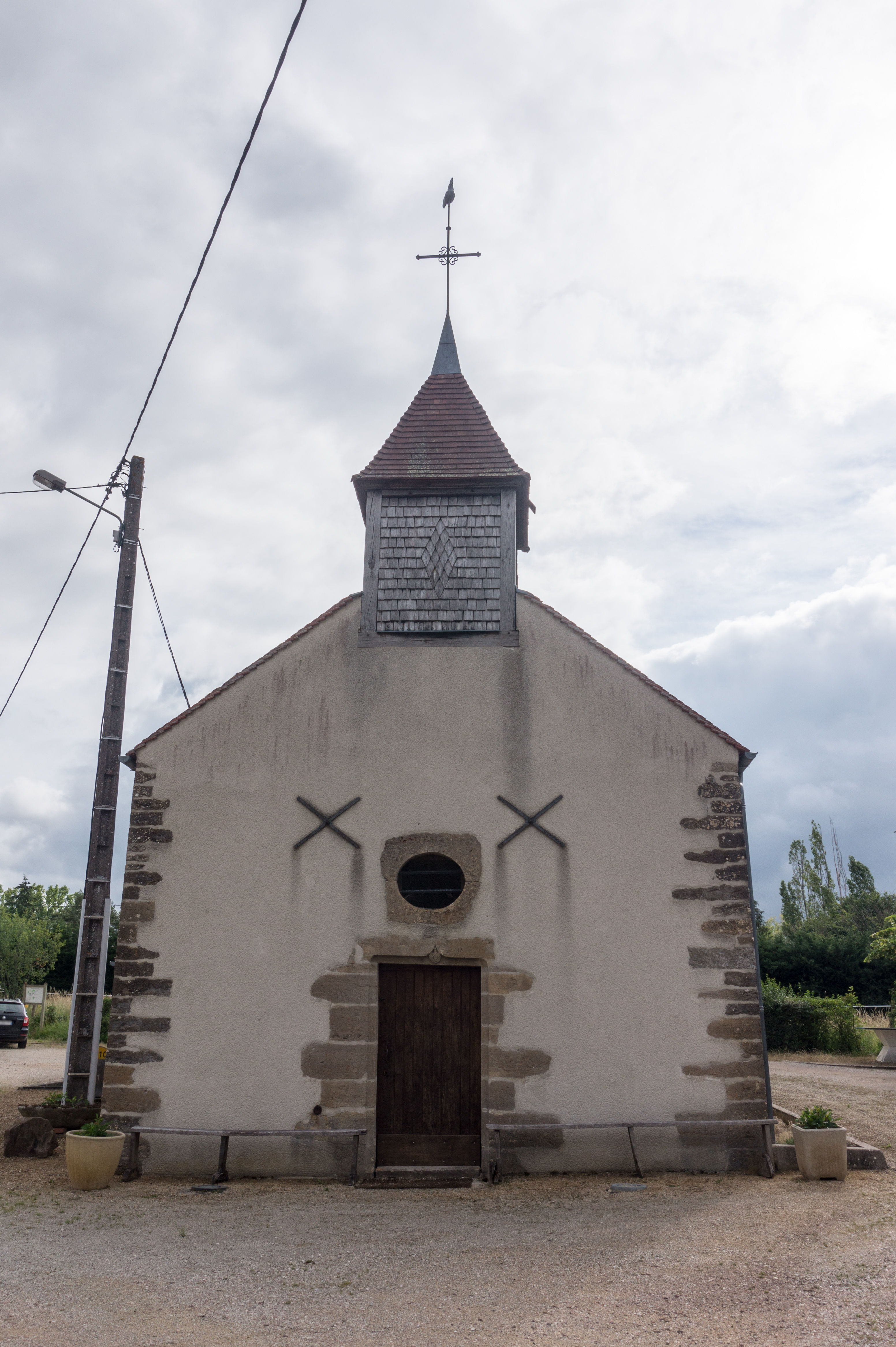 Chapelle Saint-Gengoult de Villeneuve-sous-Charigny